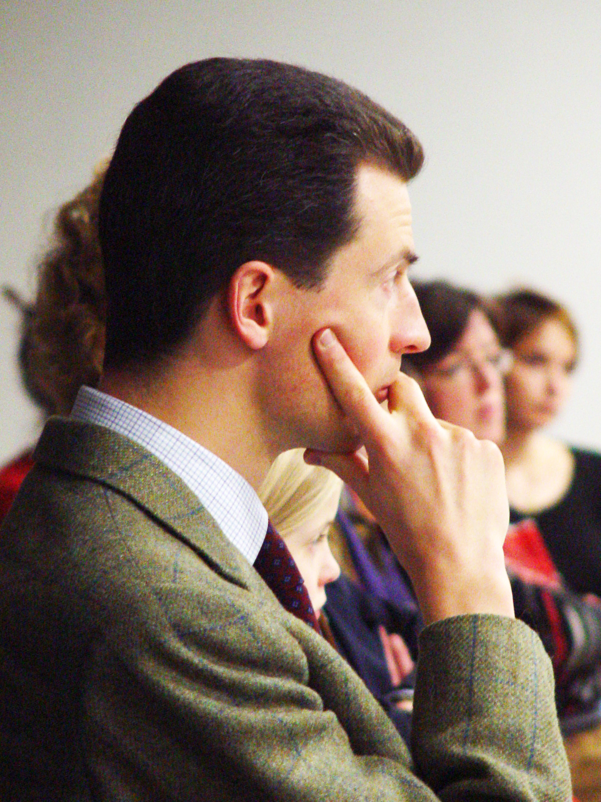 Alois